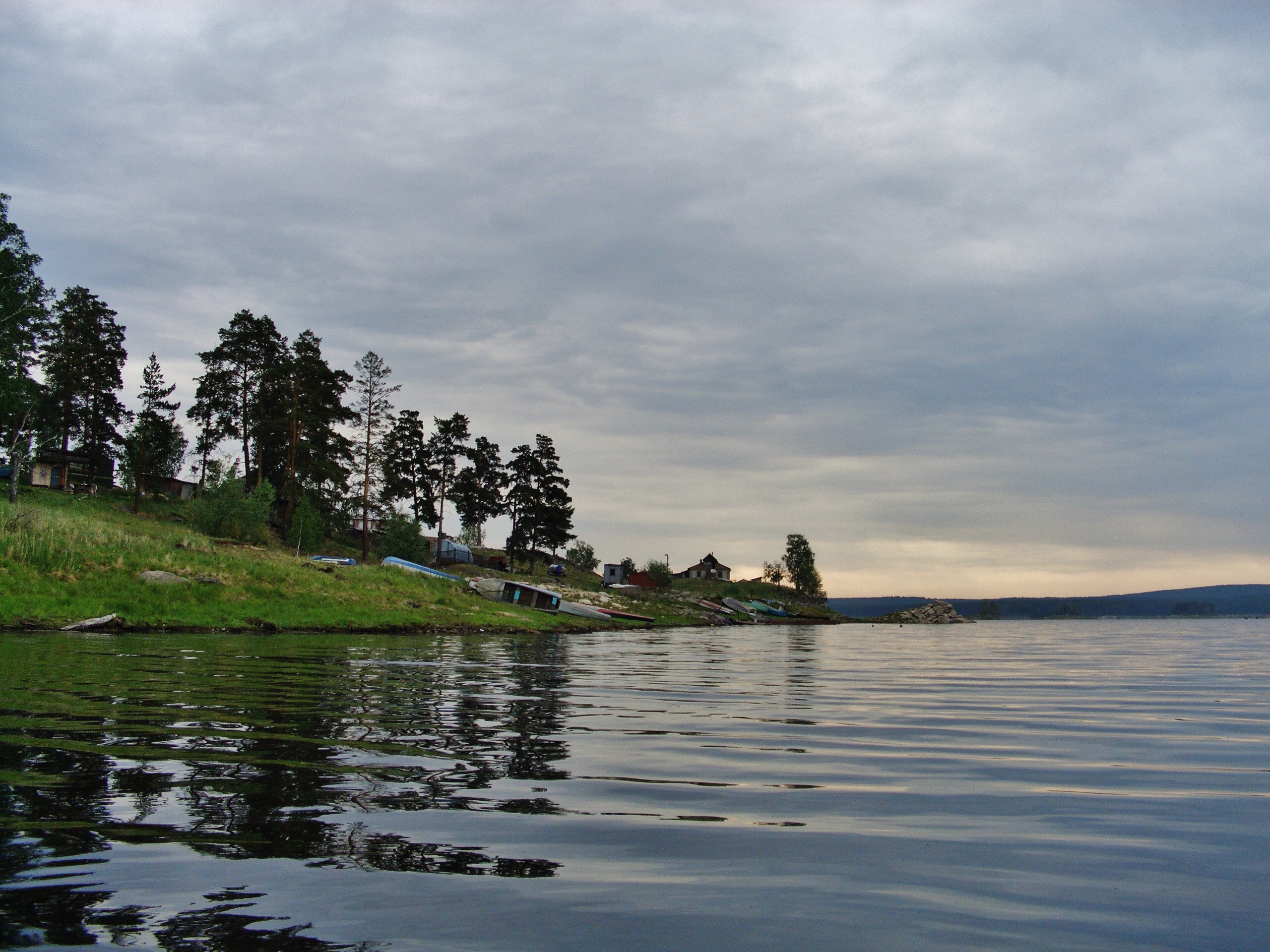 Аргазинское водохранилище.